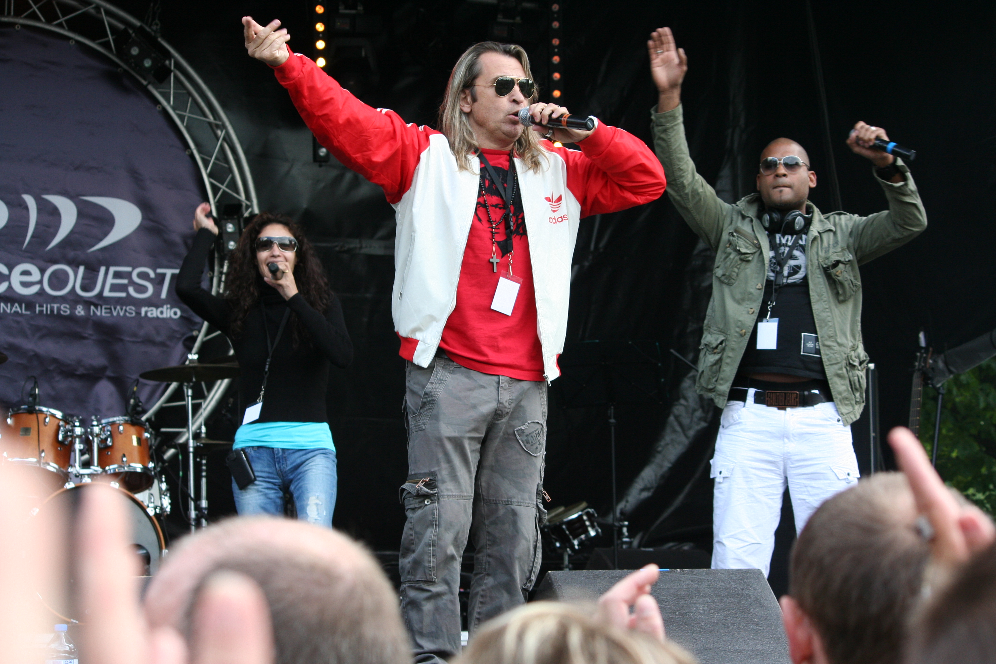 Fête de la Musique à Saint-Lô - France : le groupe Collectif Métissé pendant les balances